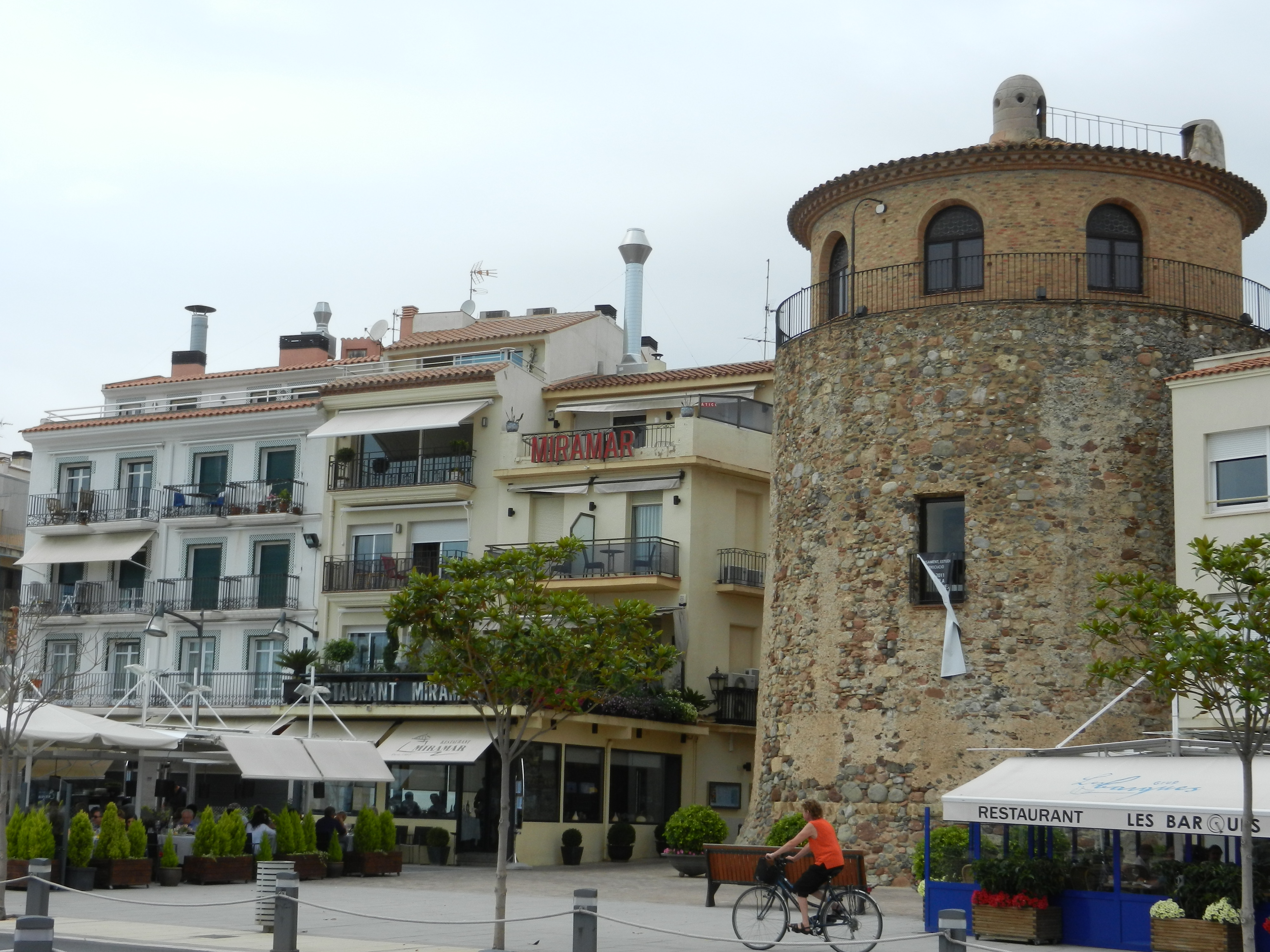 старинная башня